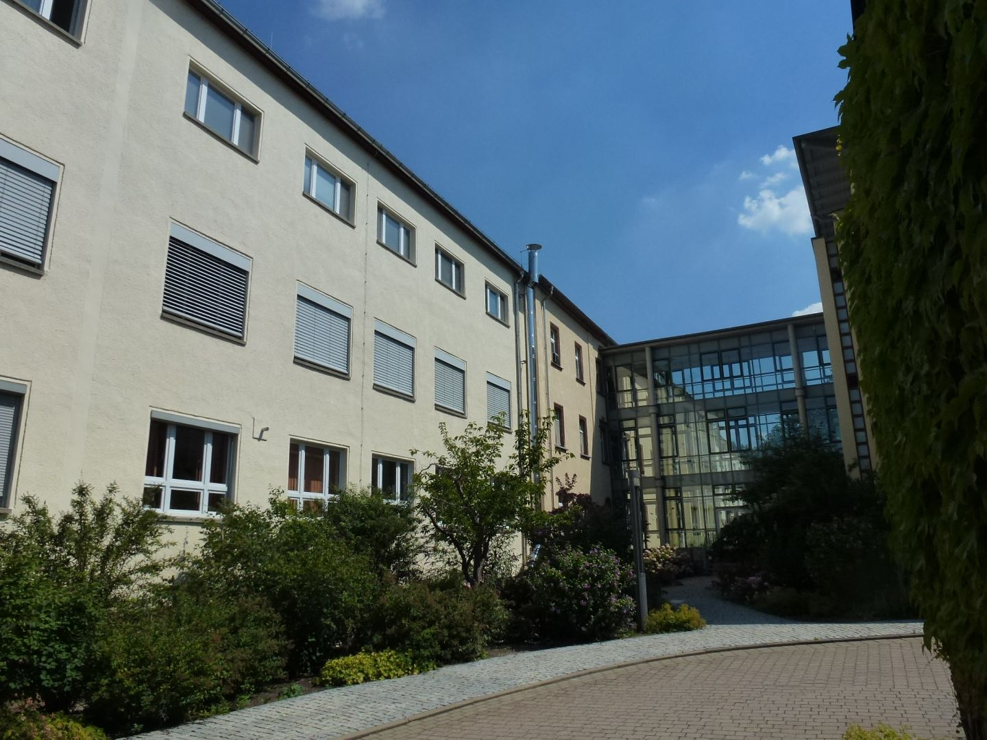 Krankenhaus Rochlitz